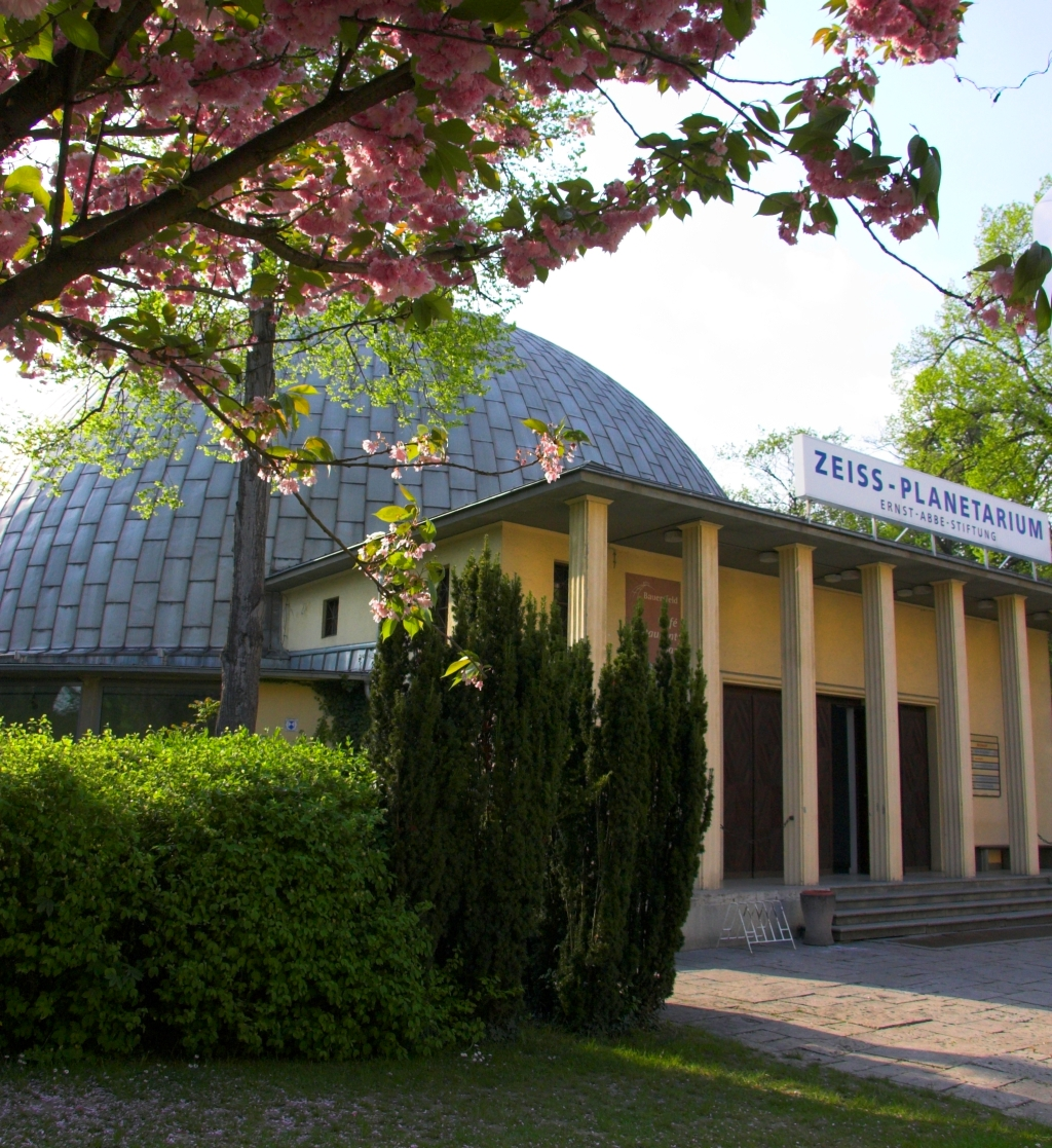 Planetarium Jena, Portal, Seitenansicht